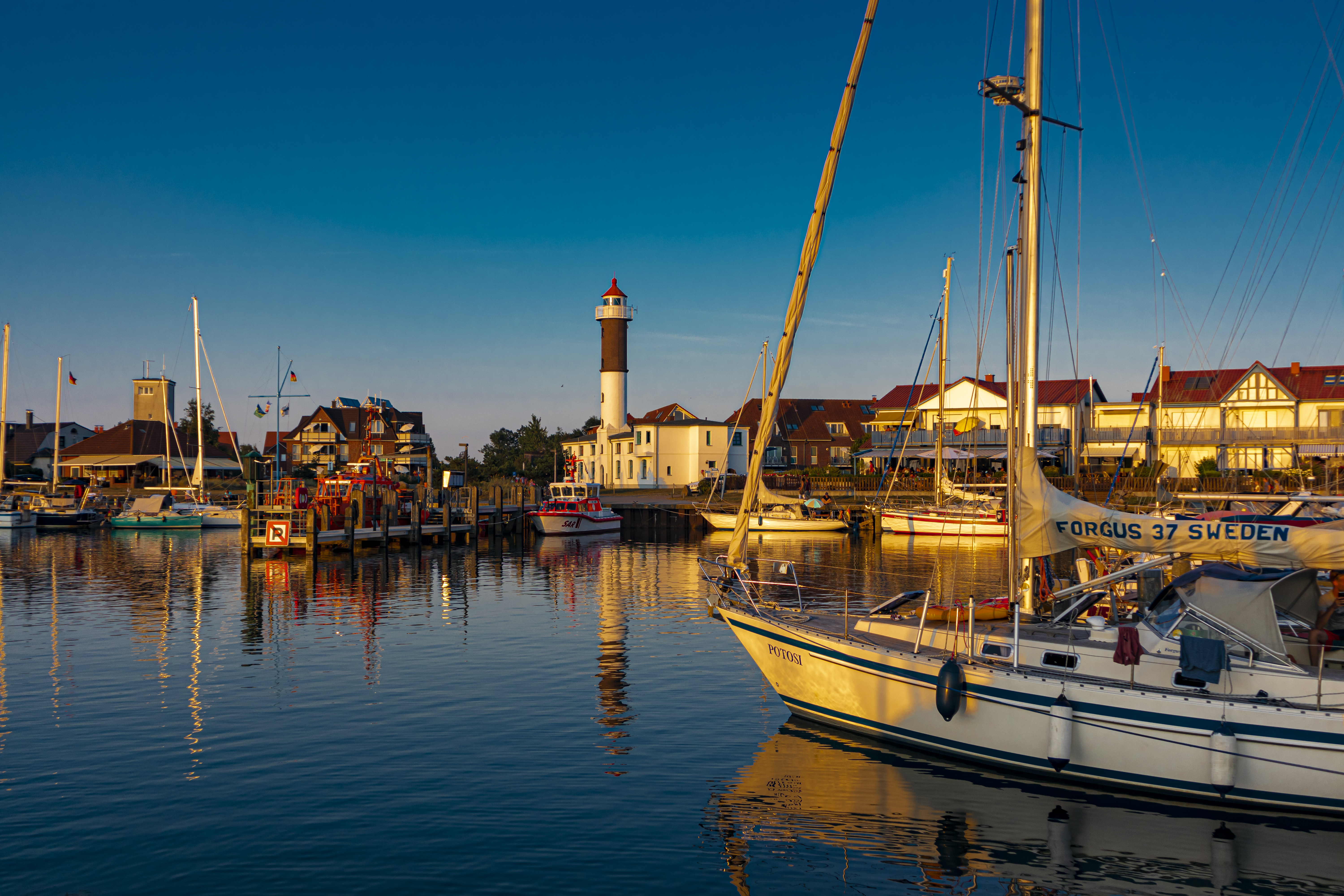 Timmendorf, Insel Poel